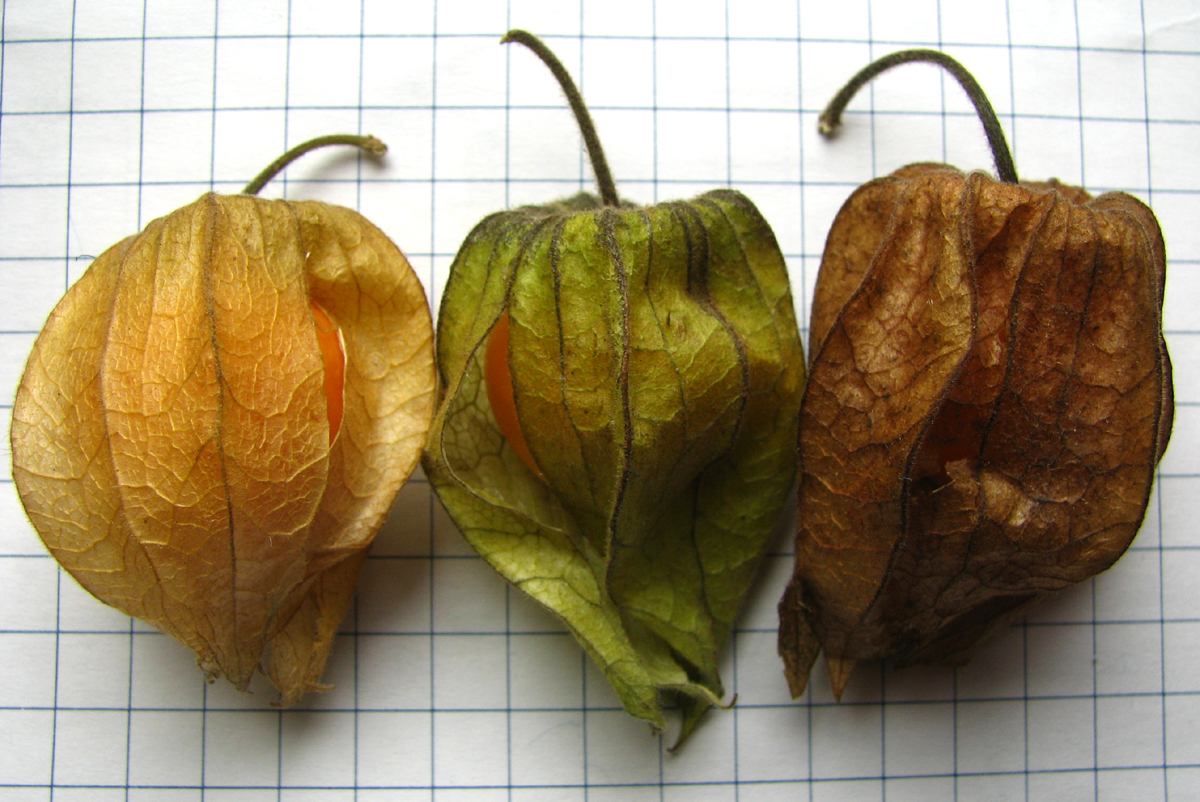 Cerises de terre québécoises (Physalis heterophylla)